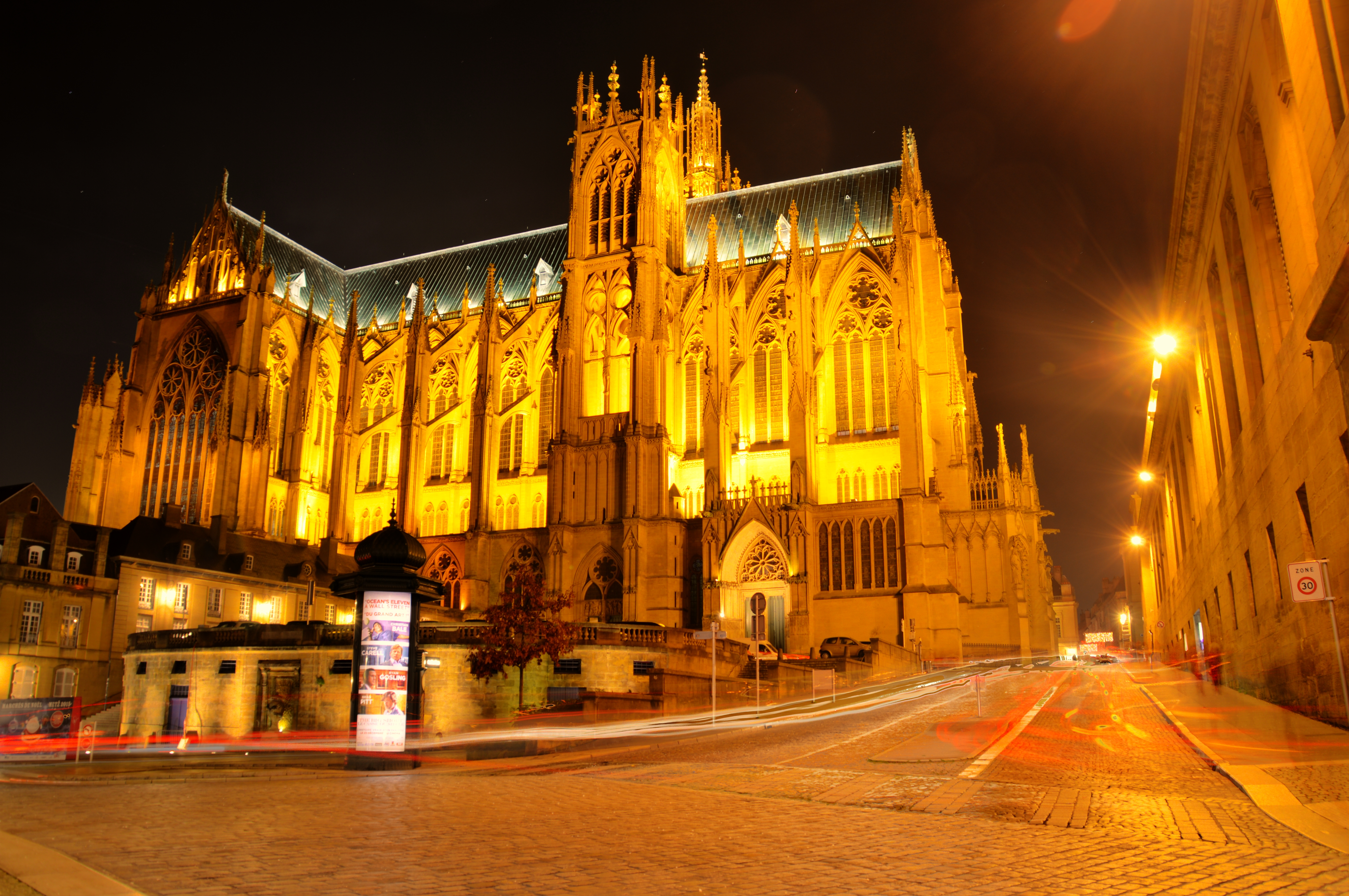 Kathedrale Saint-Étienne in Metz